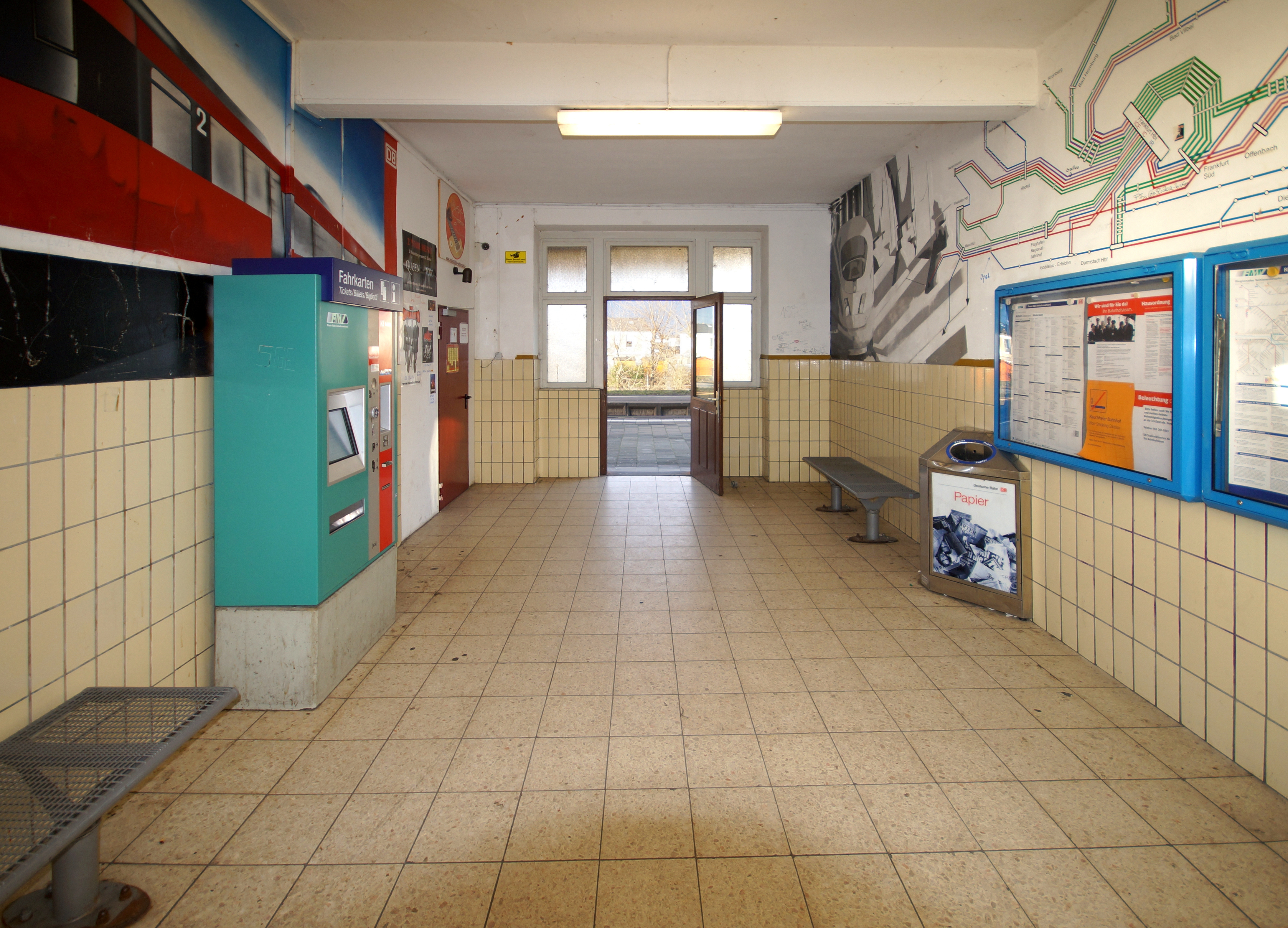 Die Bahnhofshalle des Bahnhofs Weiterstadt an der Rhein-Main-Bahn